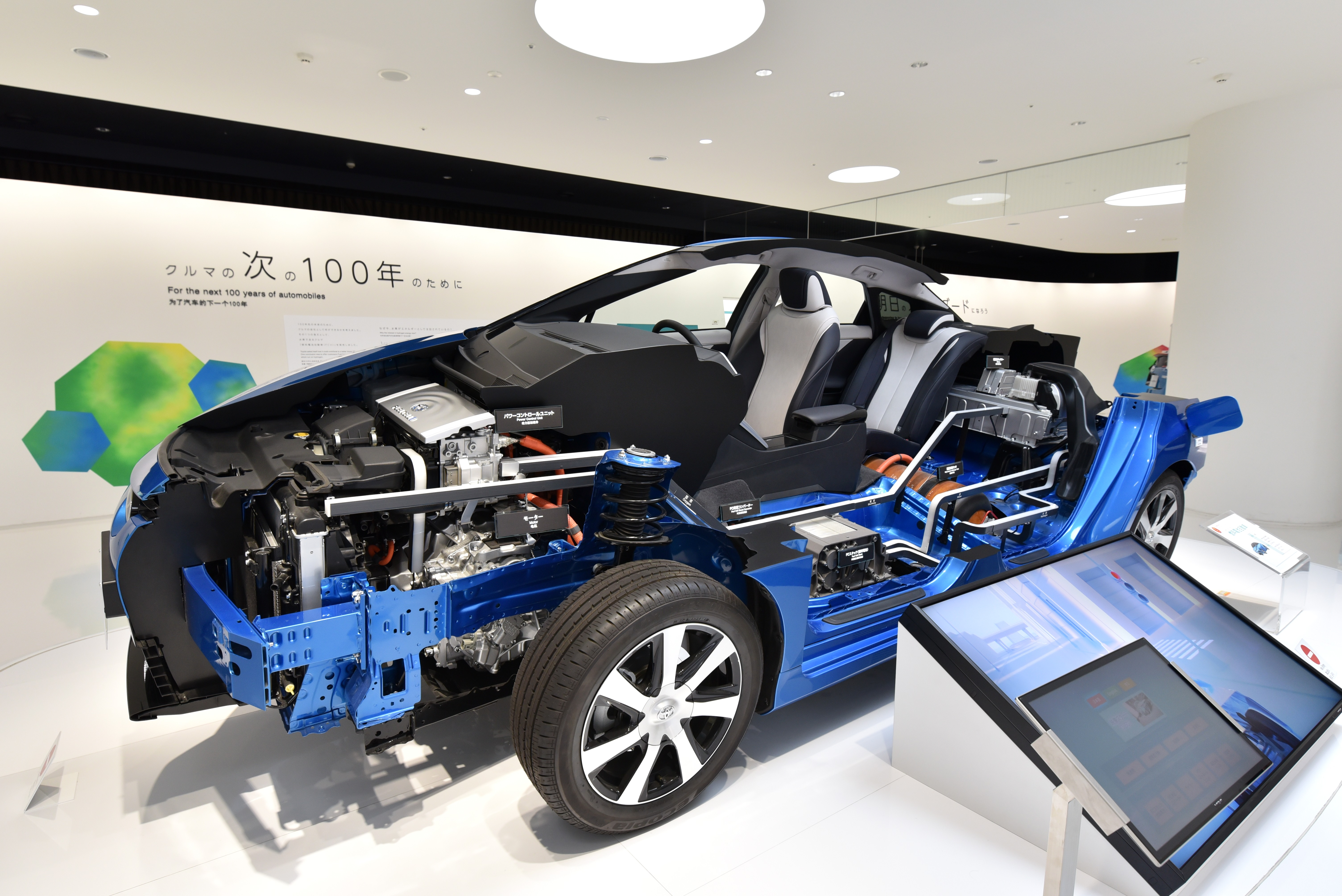 トヨタ会館の展示 Nikon D750